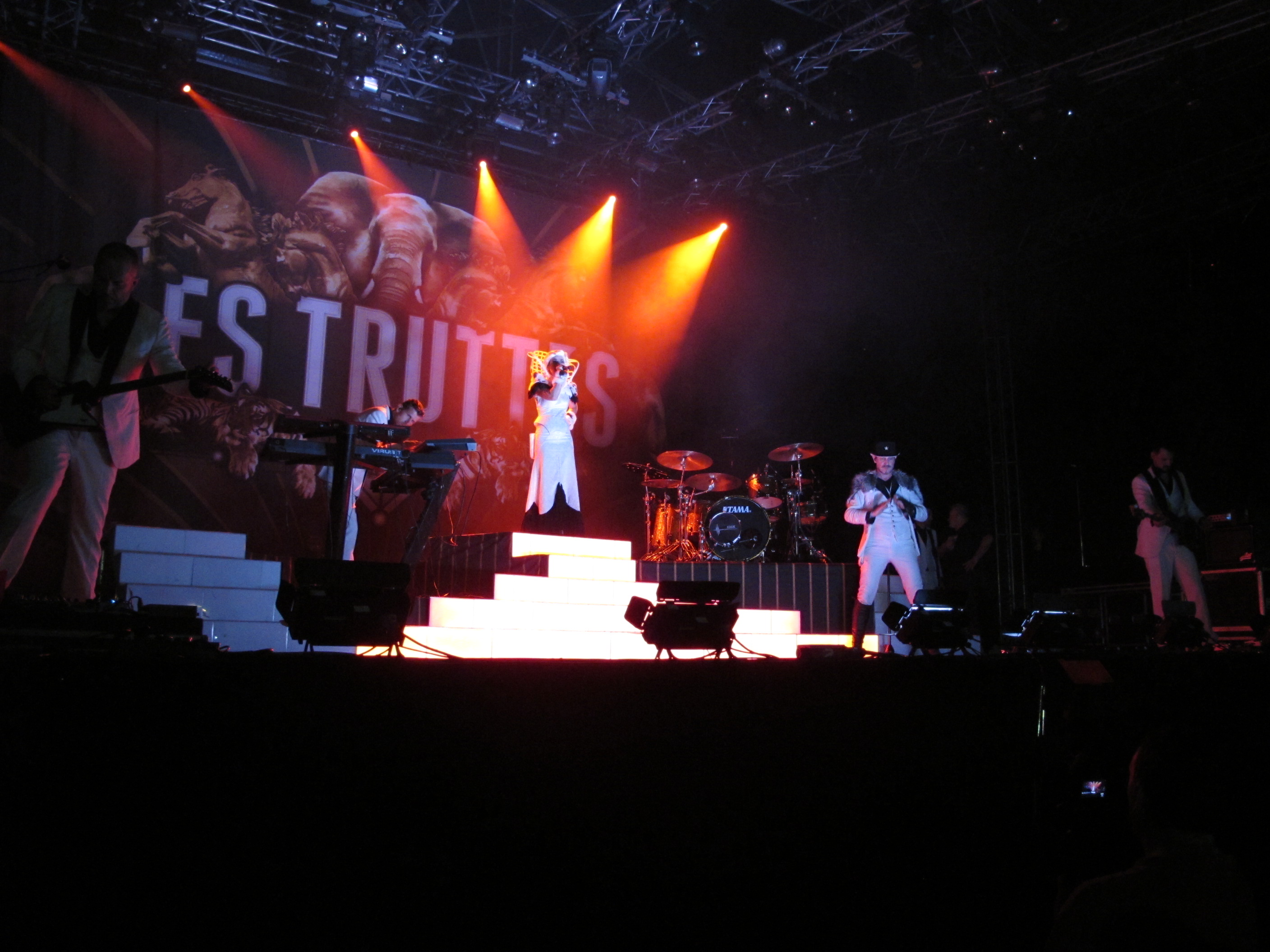 De Belgische coverband Les Truttes op Huntenpop 2016.